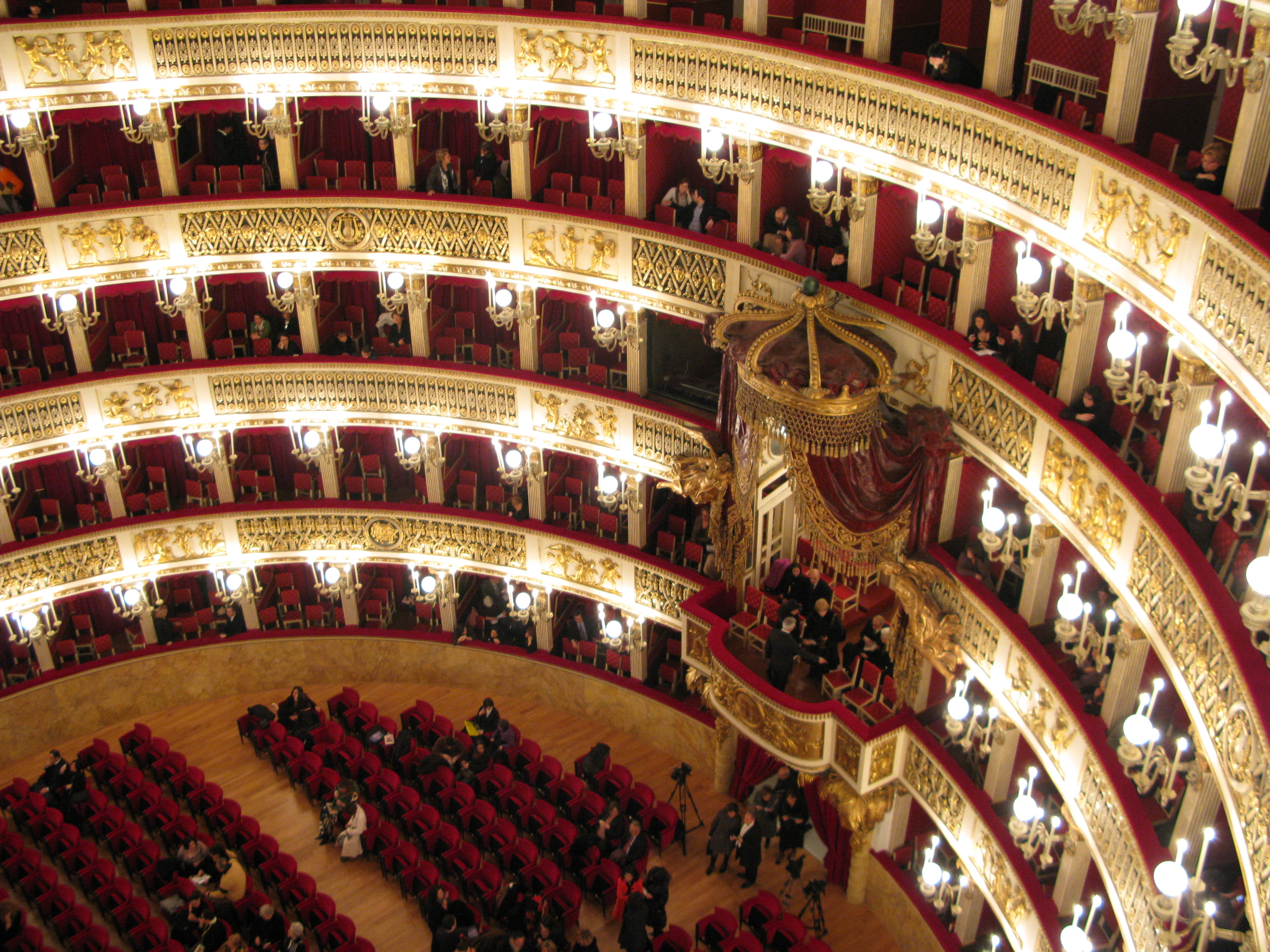 Autore Pasquale Matrisciano, fonte fotocamera personale, foto dell'interno del Teatro di San Carlo